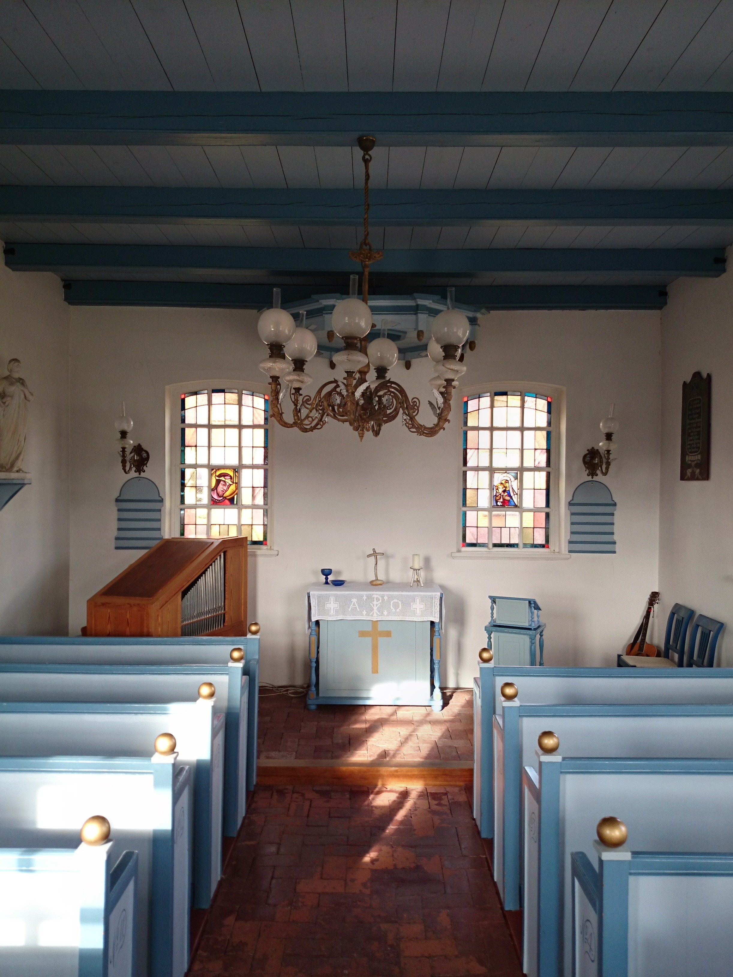 Innenraum der alten Inselkirche auf Baltrum